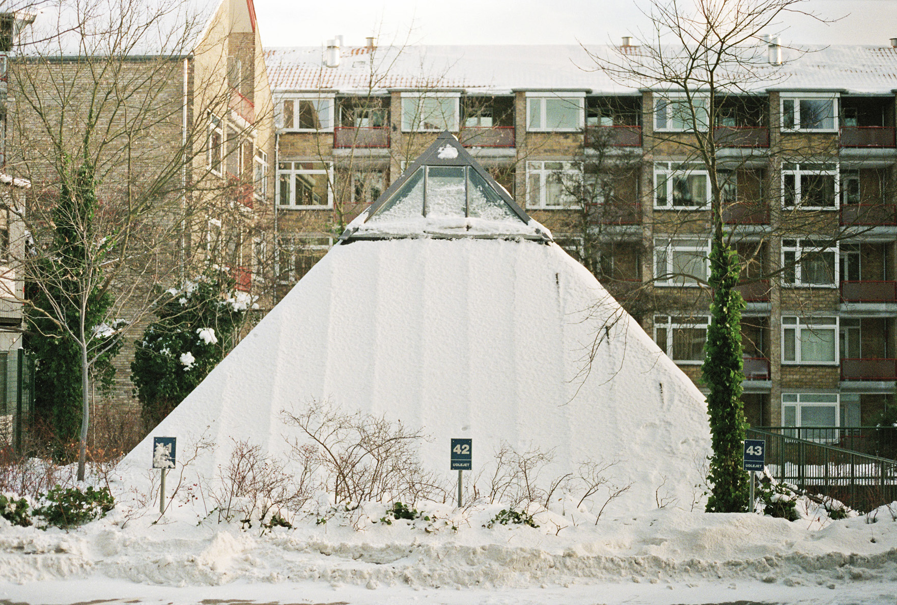 Bispeparken. Pyramideformet bygning i københavnsk boligområde. Området blev officielt defineret som værende en 'ghetto' i den danske regerings ghettoplan fra 2010.